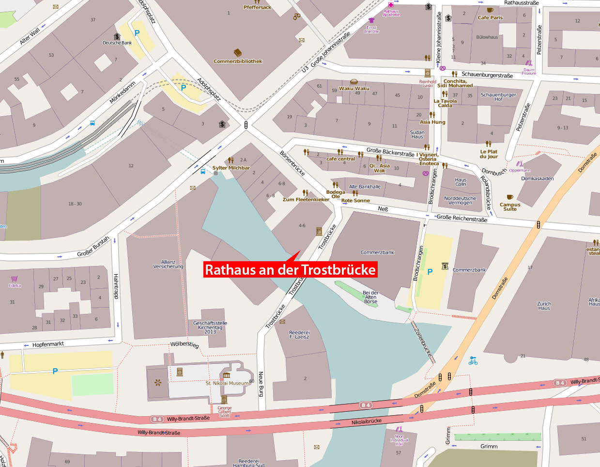 Karte des Rathauses an der Trostbrücke in Hamburg, Deutschland.